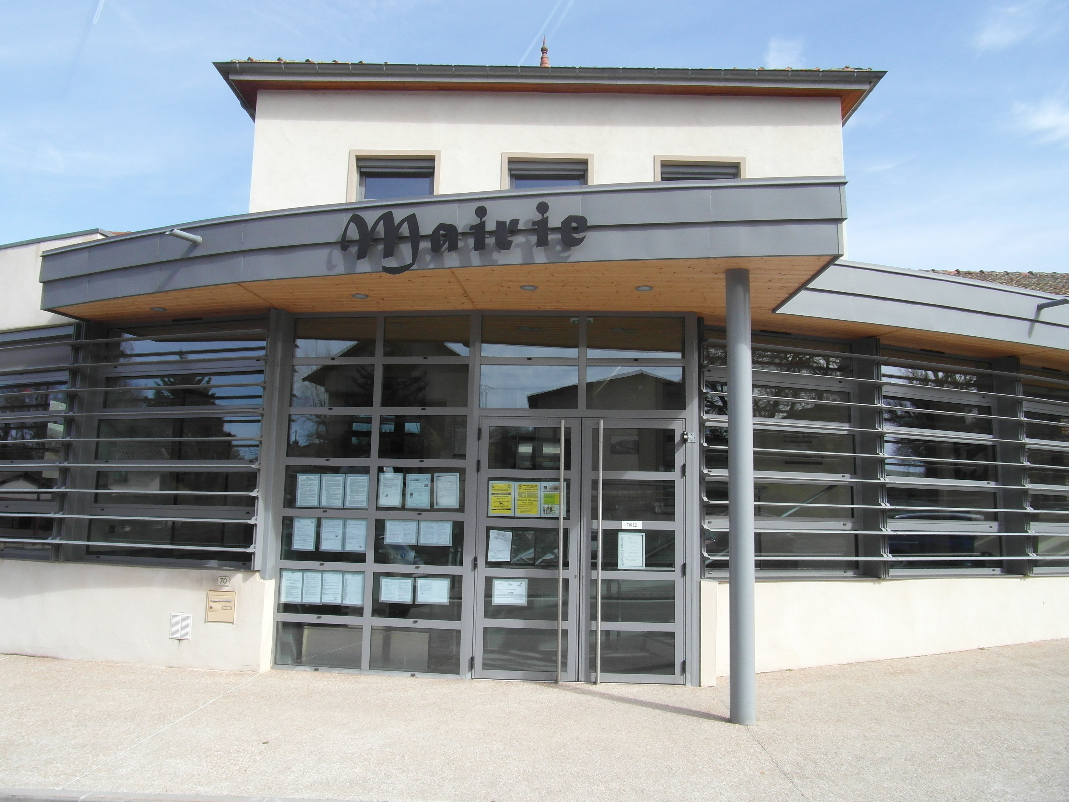 Mairie de Villeneuve-de-Marc en mars 2019